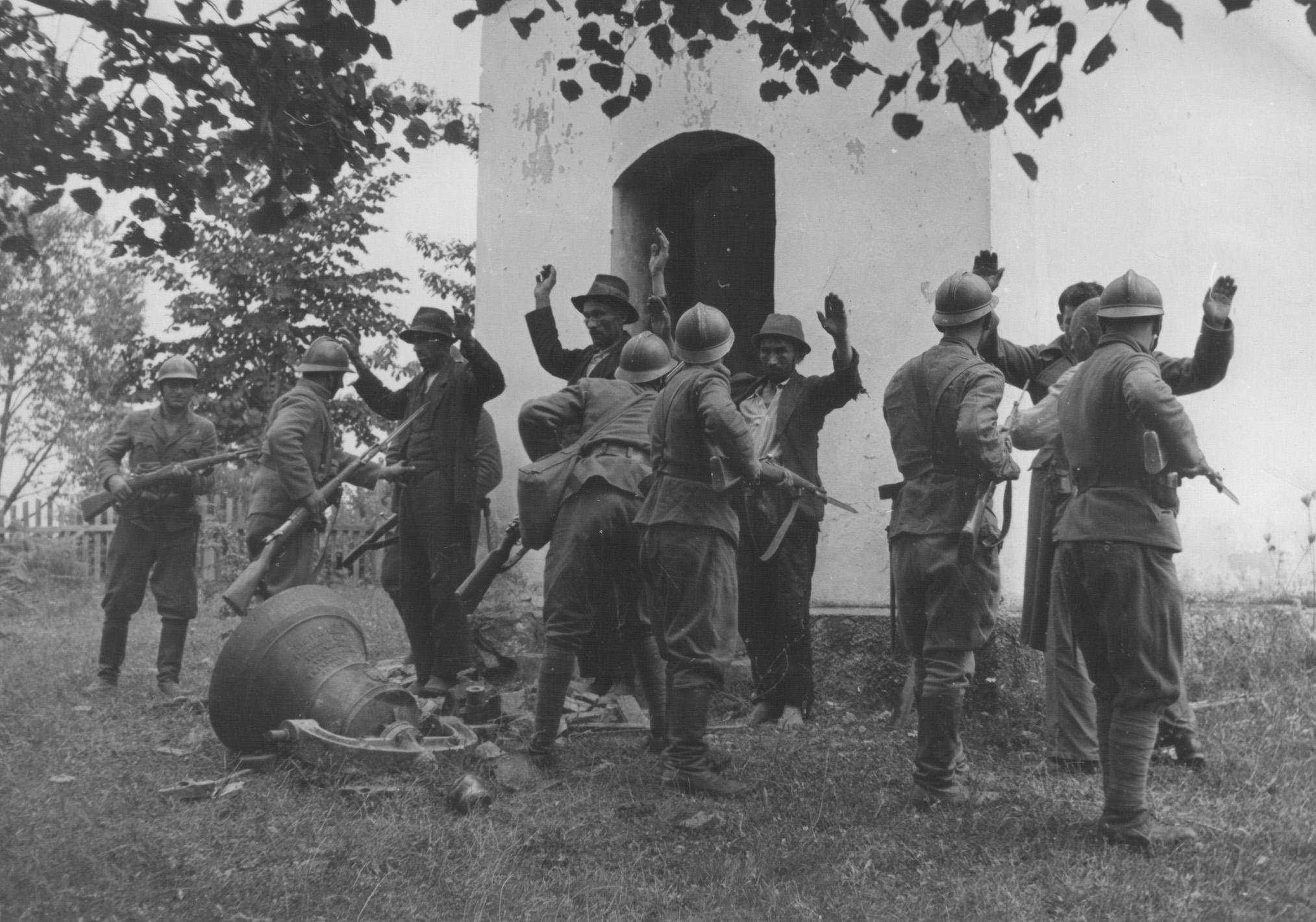 Srpskohrvatski / српскохрватски: Zarobljavanje civila kod Bosanske Dubice, selo Drakenić. U crkvi je pobijeno 107 civila, uključujući žene i decu, nakon čega je crkva bombom uništena.